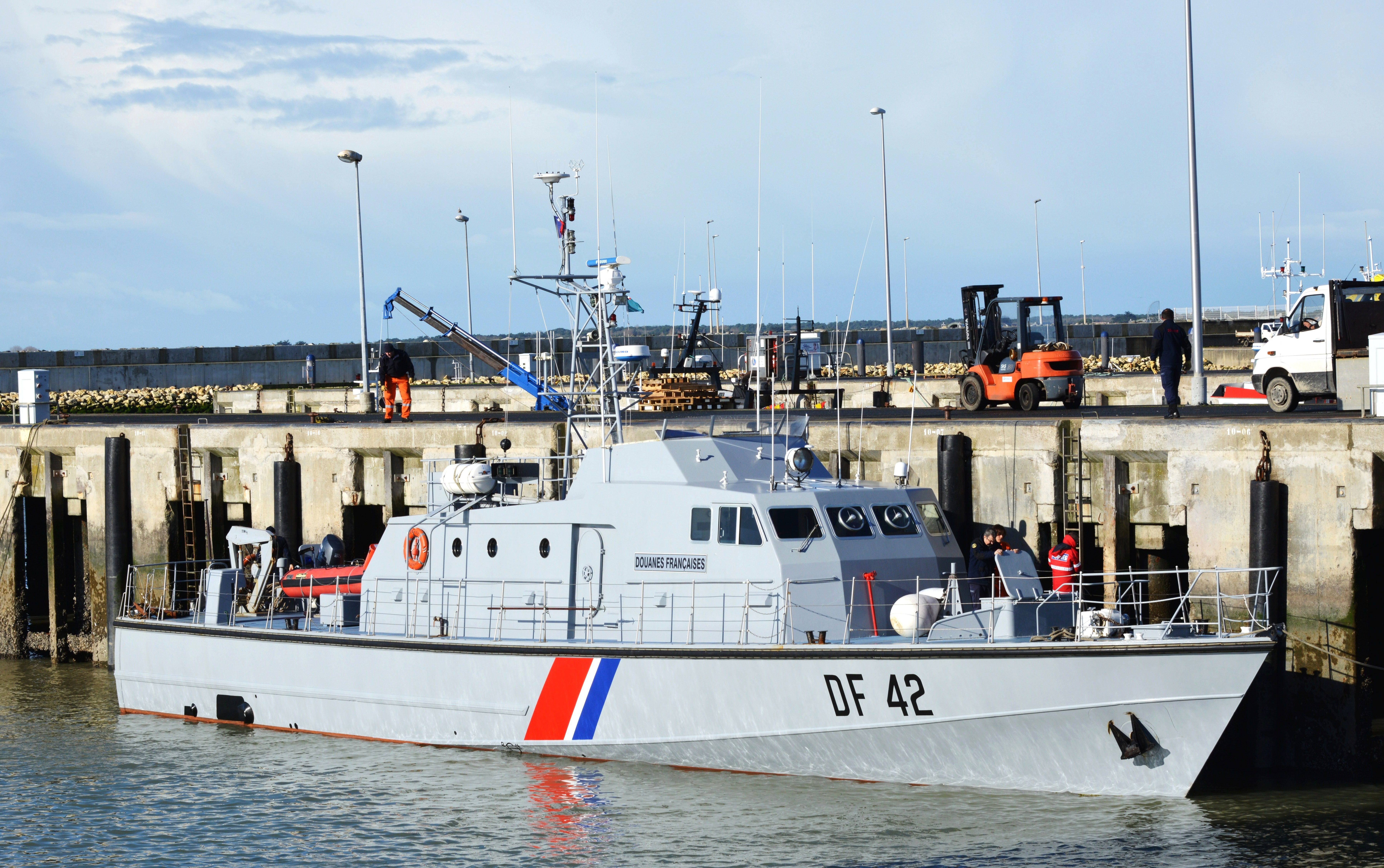 La vedette des douanes françaises "SUROIT" arrivant juste dans le port de pêche de Chef de Baie. Ce bateau est une vedette garde-côtes lancée en 1988 (Chantiers navals de L'Esterel, Cannes). Elle mesure 30,35 mètres de long et 5,80 mètres de large. La puissance de sa machine est de 2640 CV. Sa coque est en bois. Son port d'attache est Royan et sa zone de surveillance va de l'Ile d'Yeu à Arcachon (données en 2014). Immatriculation DF 42. La Rochelle, Charente Maritime, France.